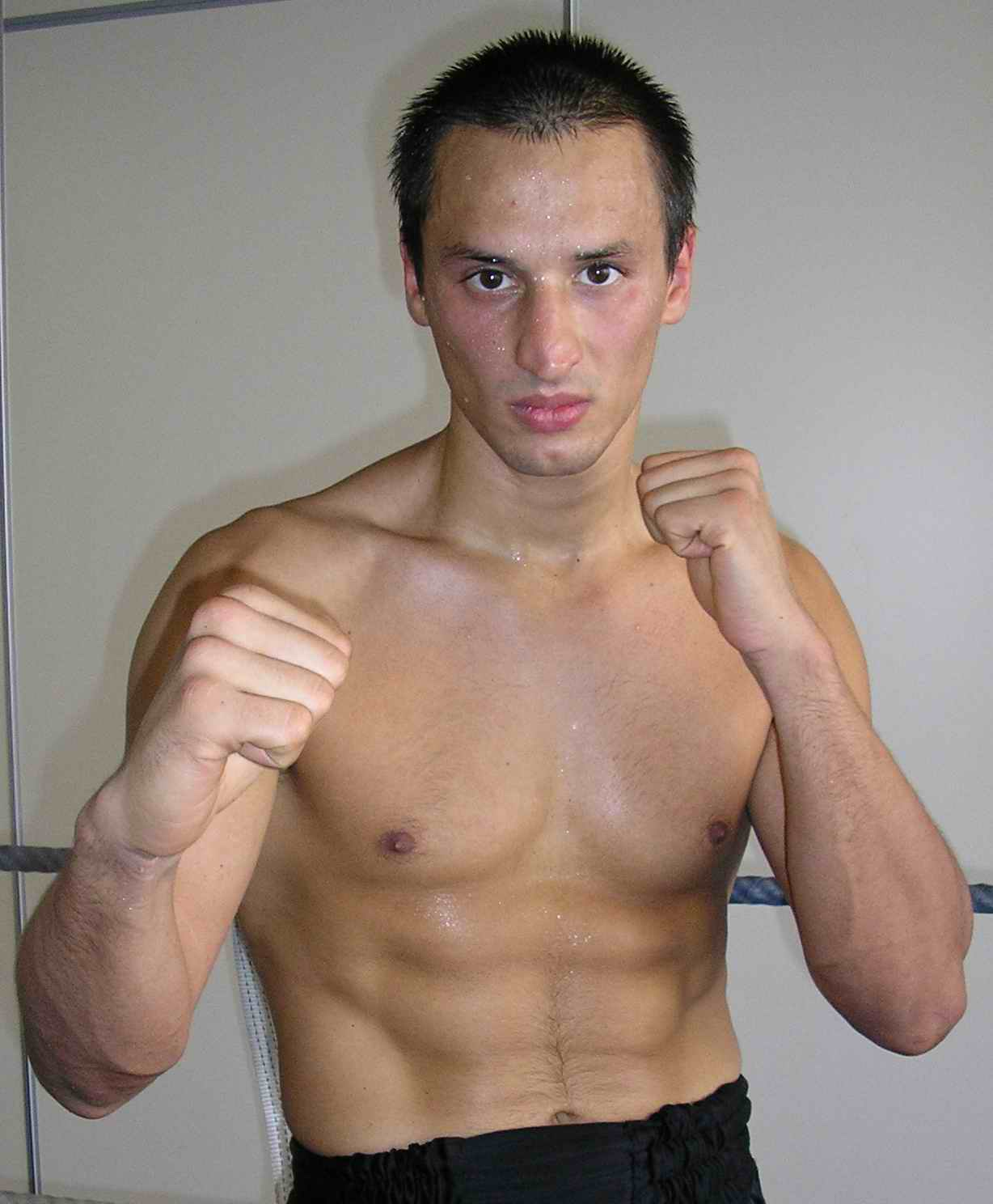 jmg_boxe.jpg